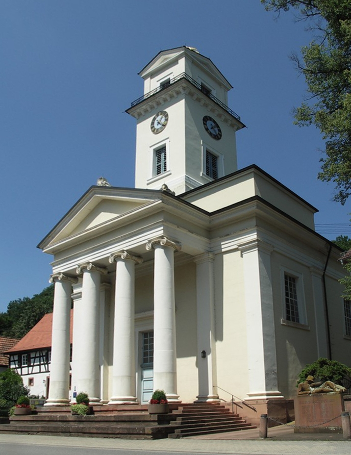 Beschreibung: Rinnthal, Neoklassizistische Kirche Quelle: selbst aufgenommen für Wikipedia am 17.7.2005 Fotograf oder Zeichner: Peter Schmenger Bearbeiter: User:Jan Arkesteijn